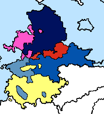 Разделение прусской провинции Саксония в 1944 году